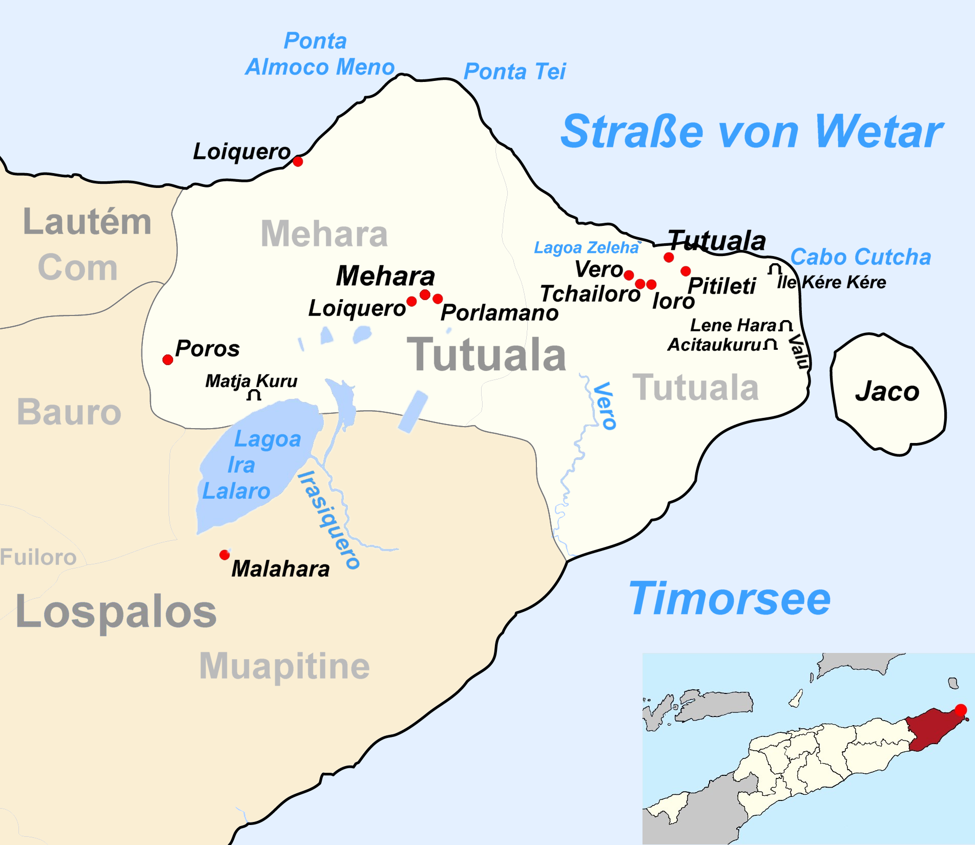 Verwaltungsamt Tutuala, Gemeinde Lautém, Osttimor. Grenzen seit 2015